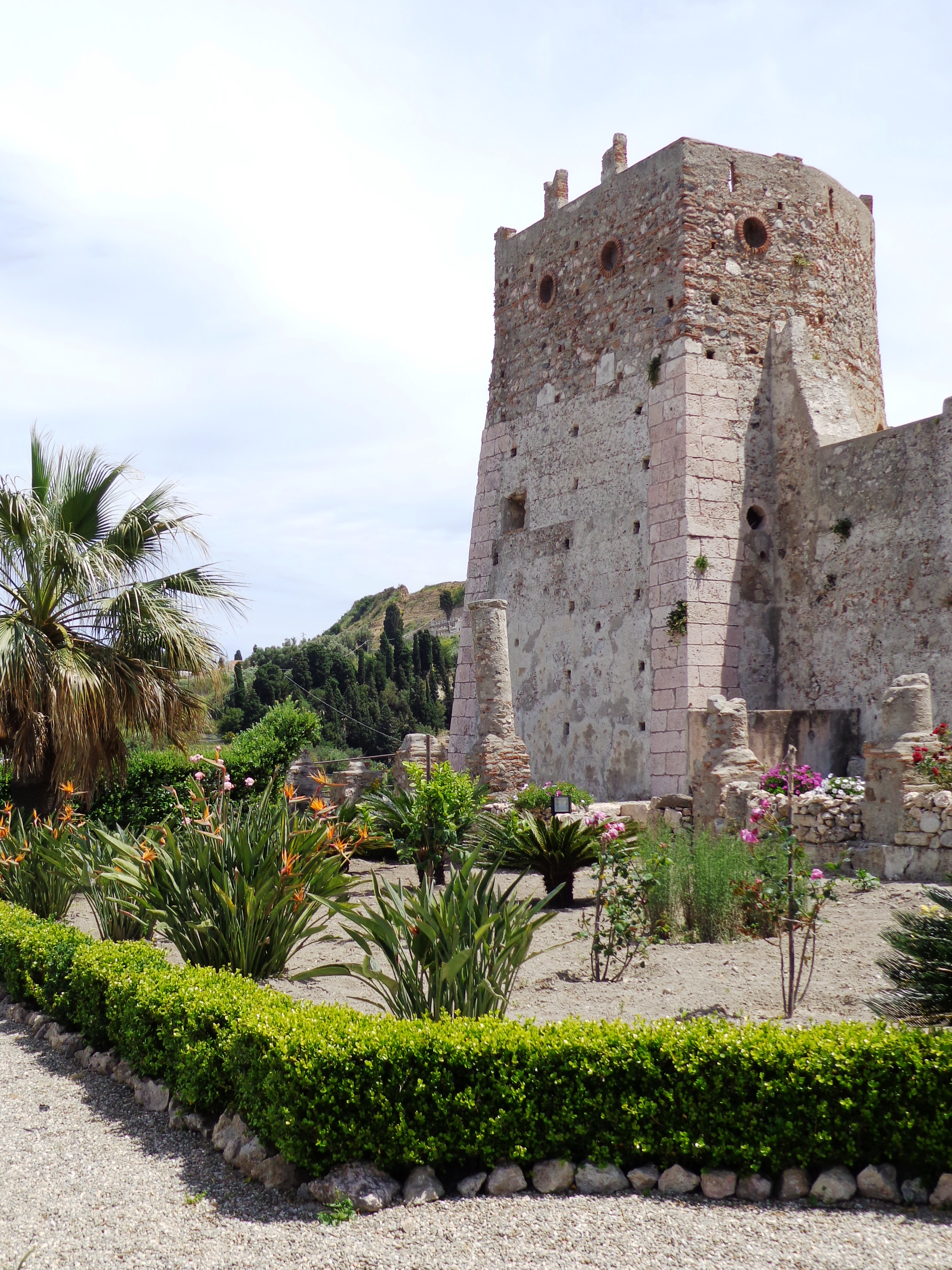 Castello di Bauso This is a photo of a monument which is part of cultural heritage of Italy.